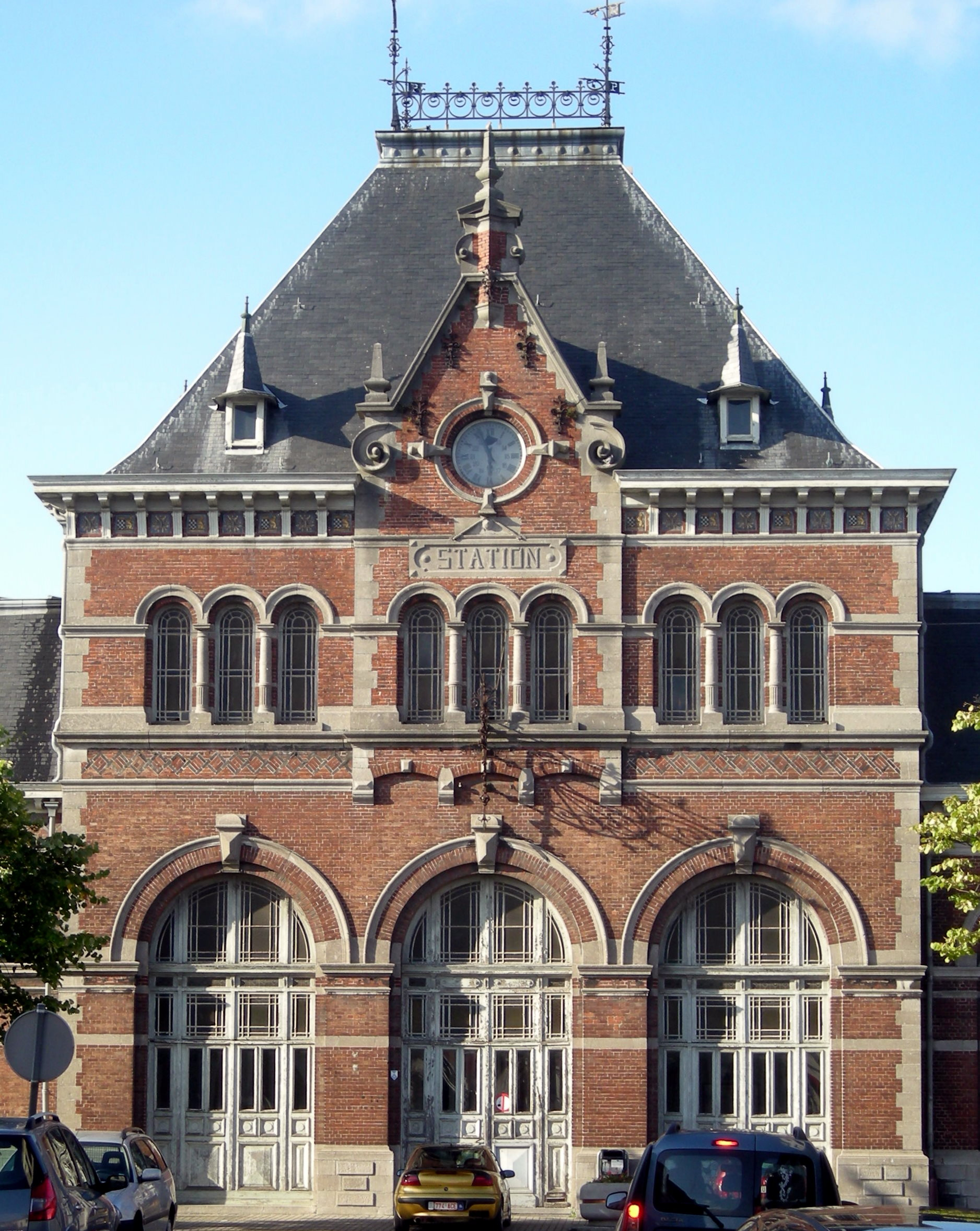 Gare de Péruwelz à la frontière belge, terminus de l'ancienne ligne de Chemin de fer des Houillères Somain-Péruwelz